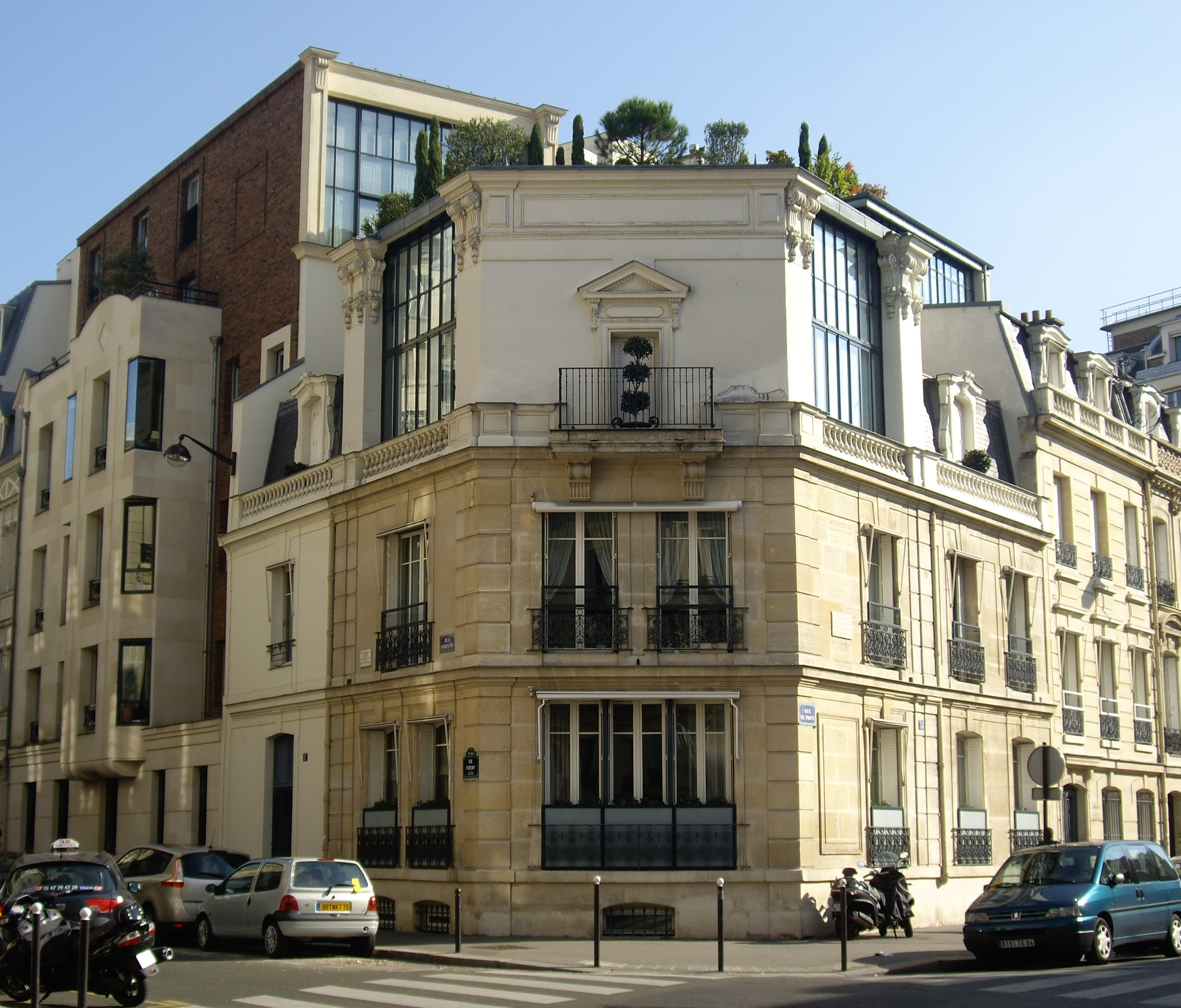 Angle de la rue Fortuny et de la rue de Prony, Paris 17e. Sur la gauche, le n° 2 de la rue Fortuny, où habita Edmond Rostand. Sur la droite, le n° 38 de la rue de Prony, où demeura Auguste Chapuis.